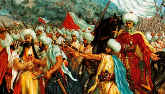 معركة عنجر بين أمير جبل لُبنان فخر الدين المعني الثاني ووالي دمشق العُثماني، كما تخيَّلها الرسَّام اللُبناني قيصر الجميِّل.